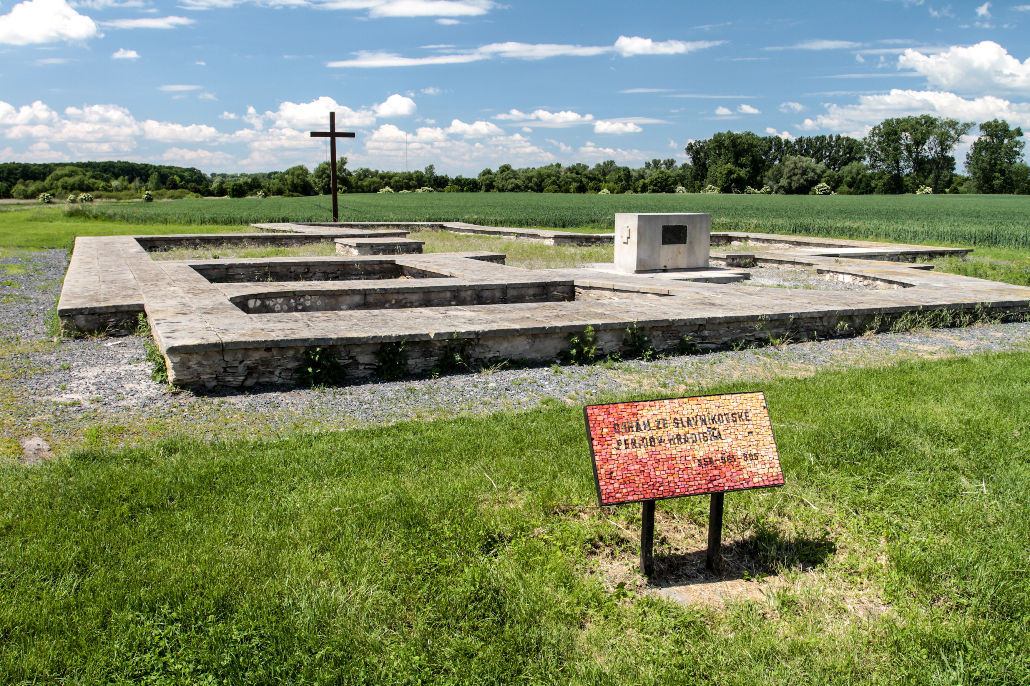 Slavníkovská Libice, Libice nad Cidlinou.